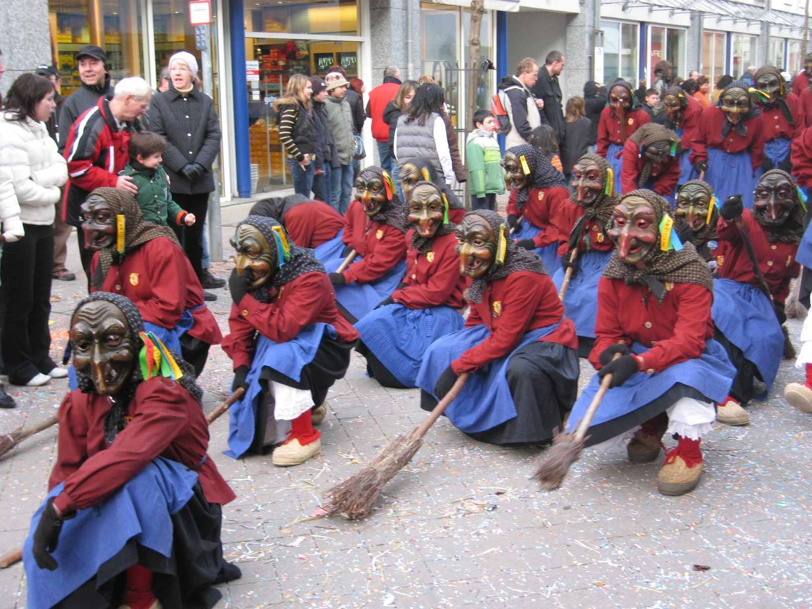 Buchhorn-Hexen auf dem Umzug in Friedrichshafen 2007